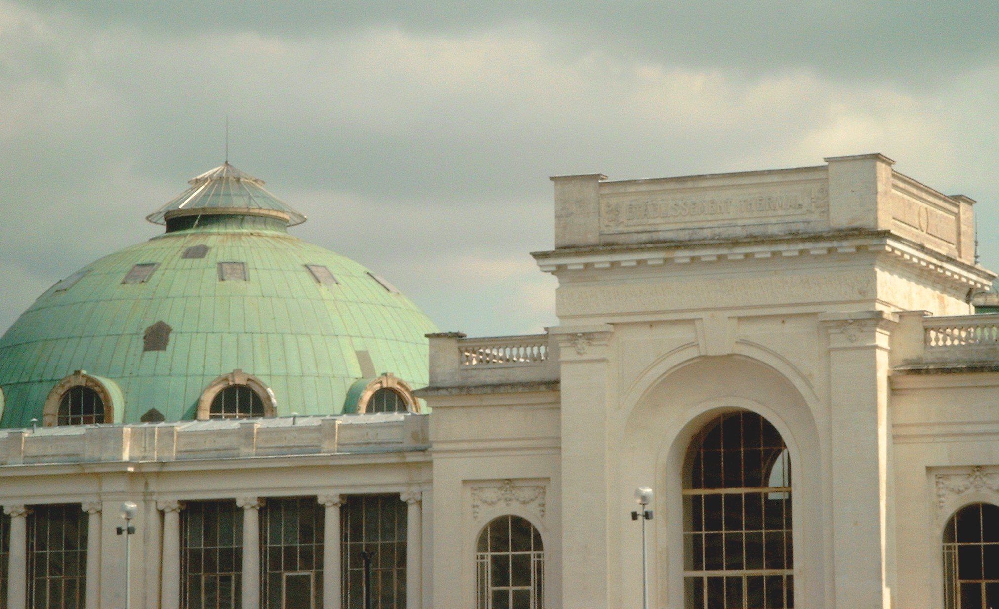 Le dôme de la piscine ronde Nancy Thermale.